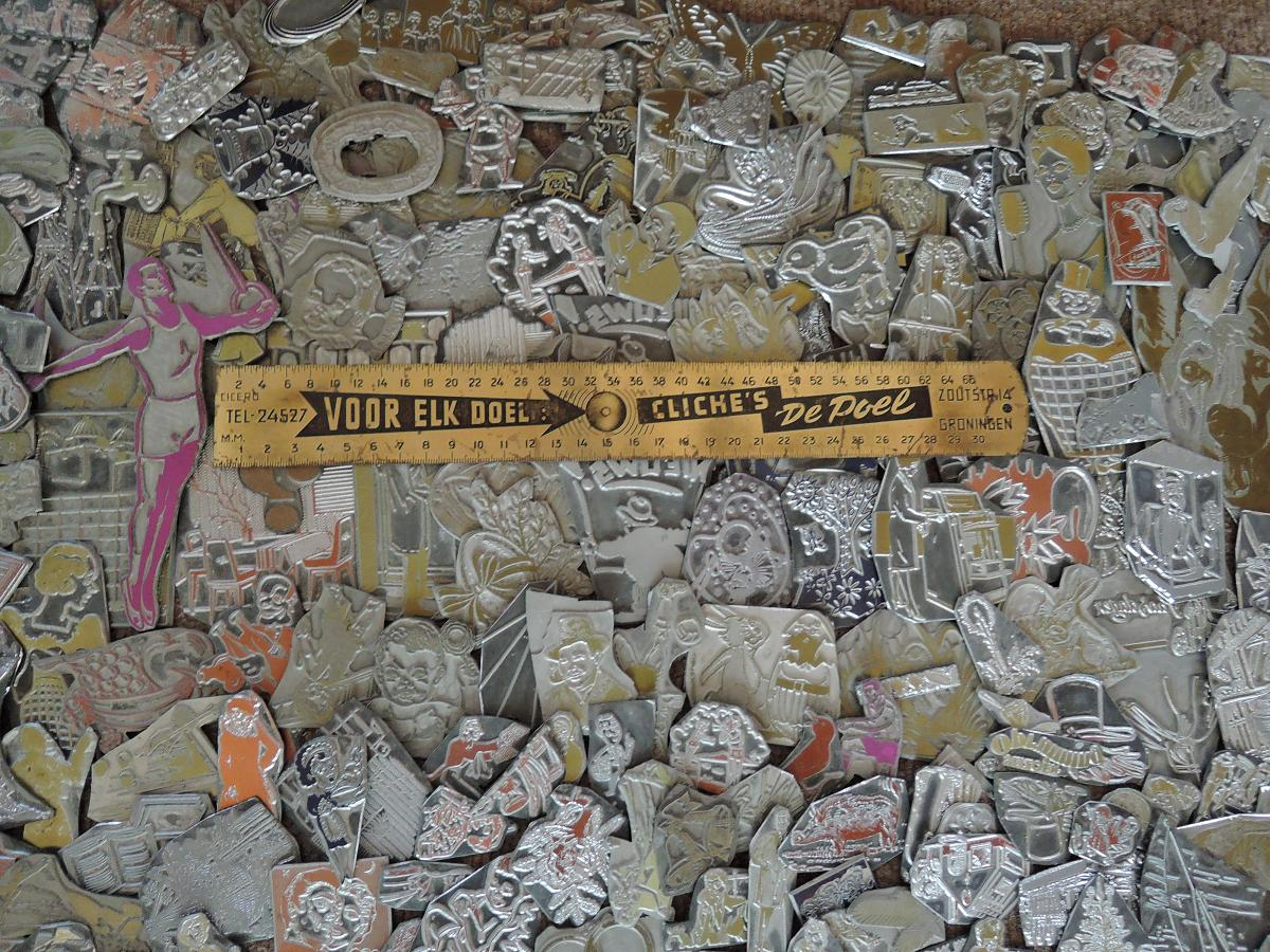 Clichémaker